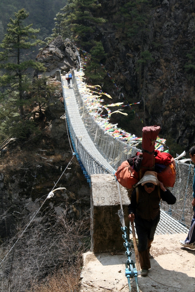 ilker's everest base camp trek